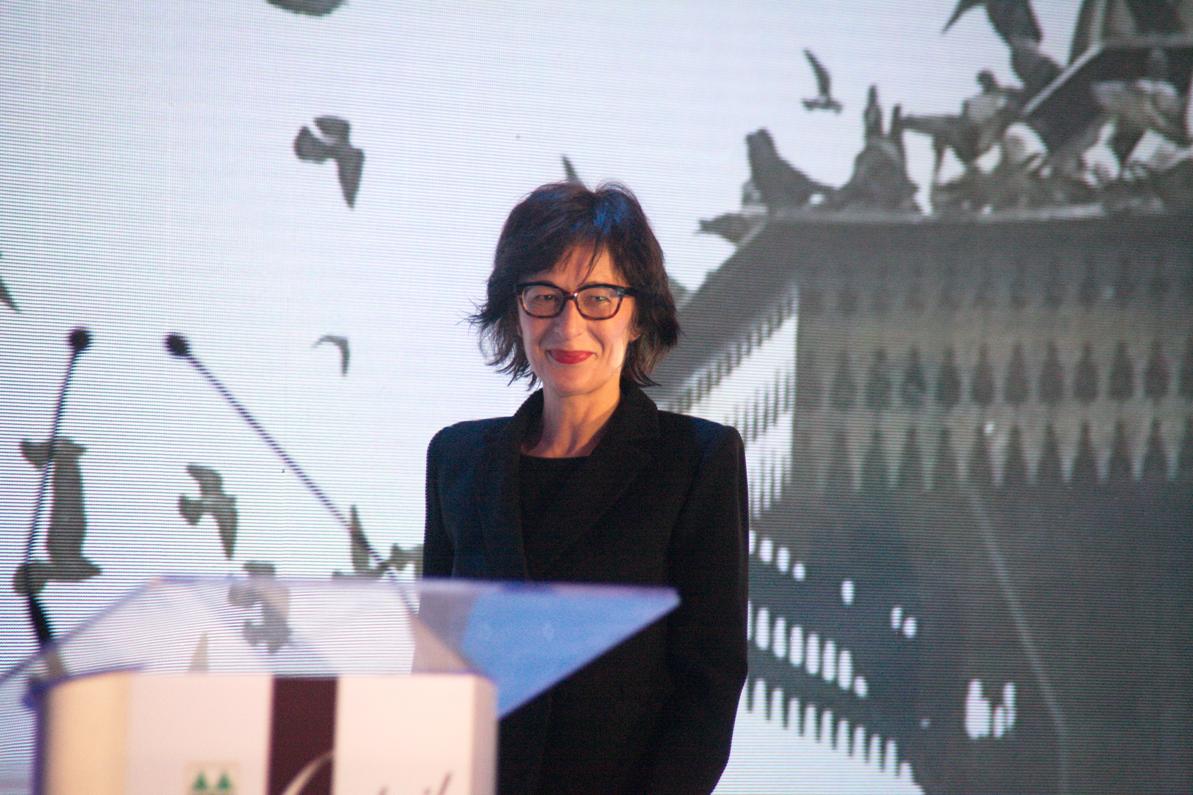 Florence Hartmann, periodista francesa corresponsal de Le Monde als Balcans els anys 1990, en el seu nomenament com a "ciutadana honorífica de Sarajevo", el 6 d'abril de 2015